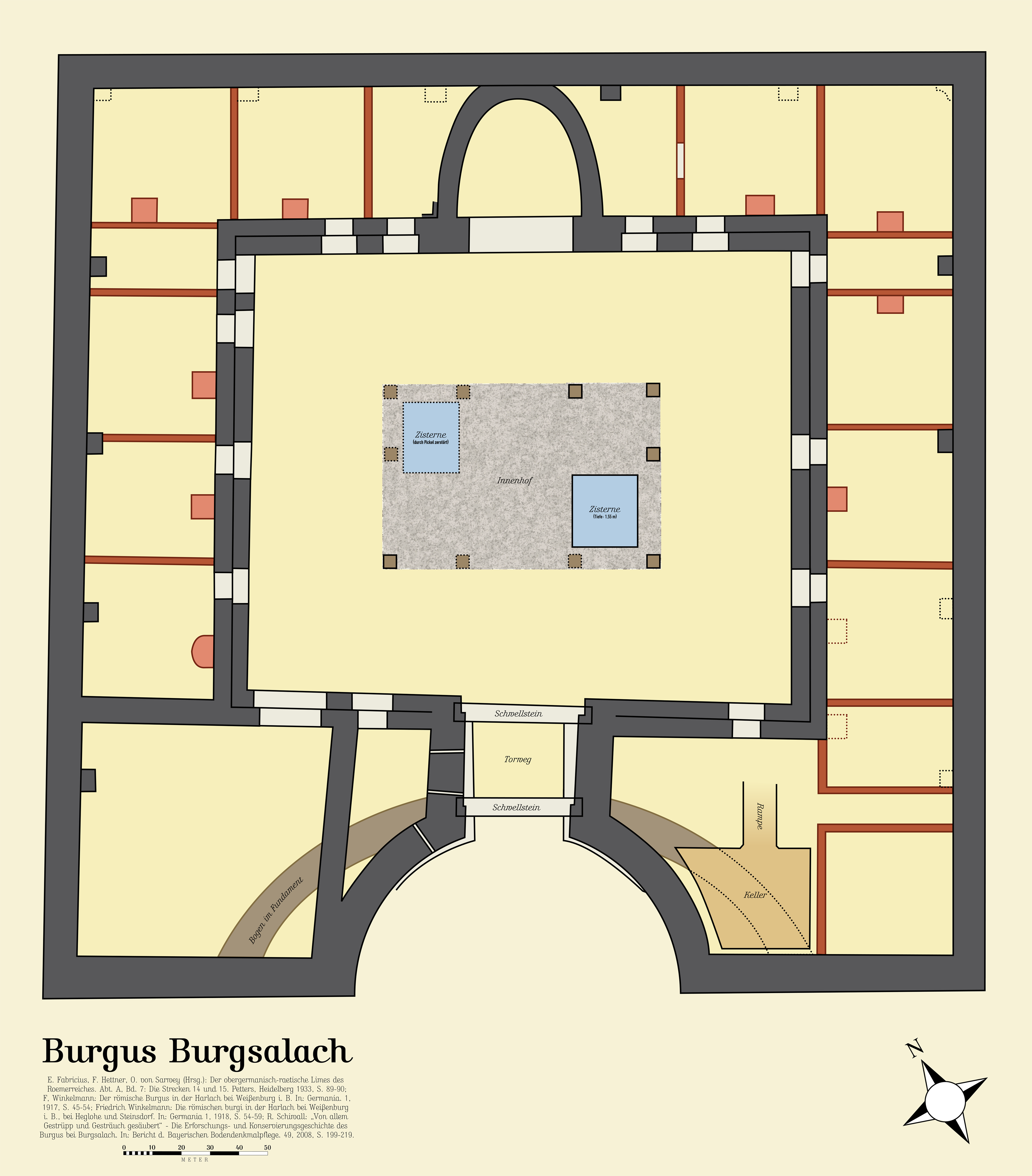 Der Burgus Burgsalach nach den historischen Plänen von F. Winkelmann (1917/1918) und den Ergänzungen durch R. Schiwall (2008). Die Quellen sind in der Datei selbst angegeben.